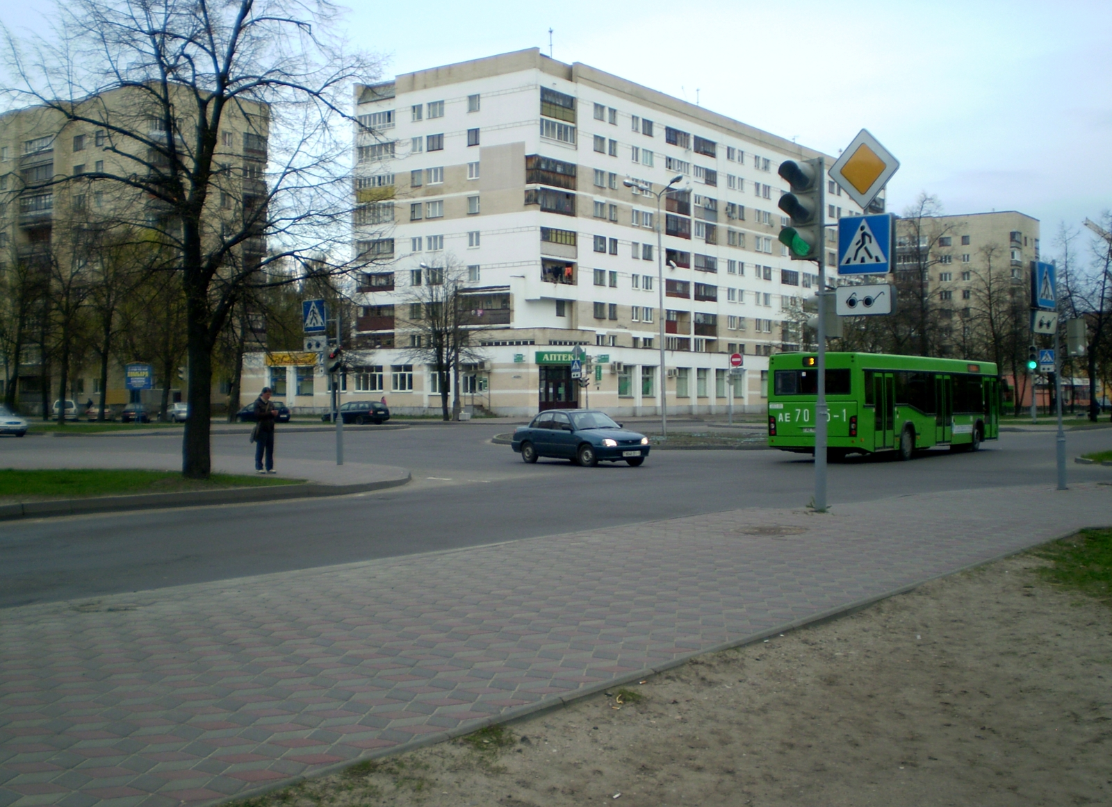 Скрыжаванне вул. Міцкевіча і бул. Касманаўтаў